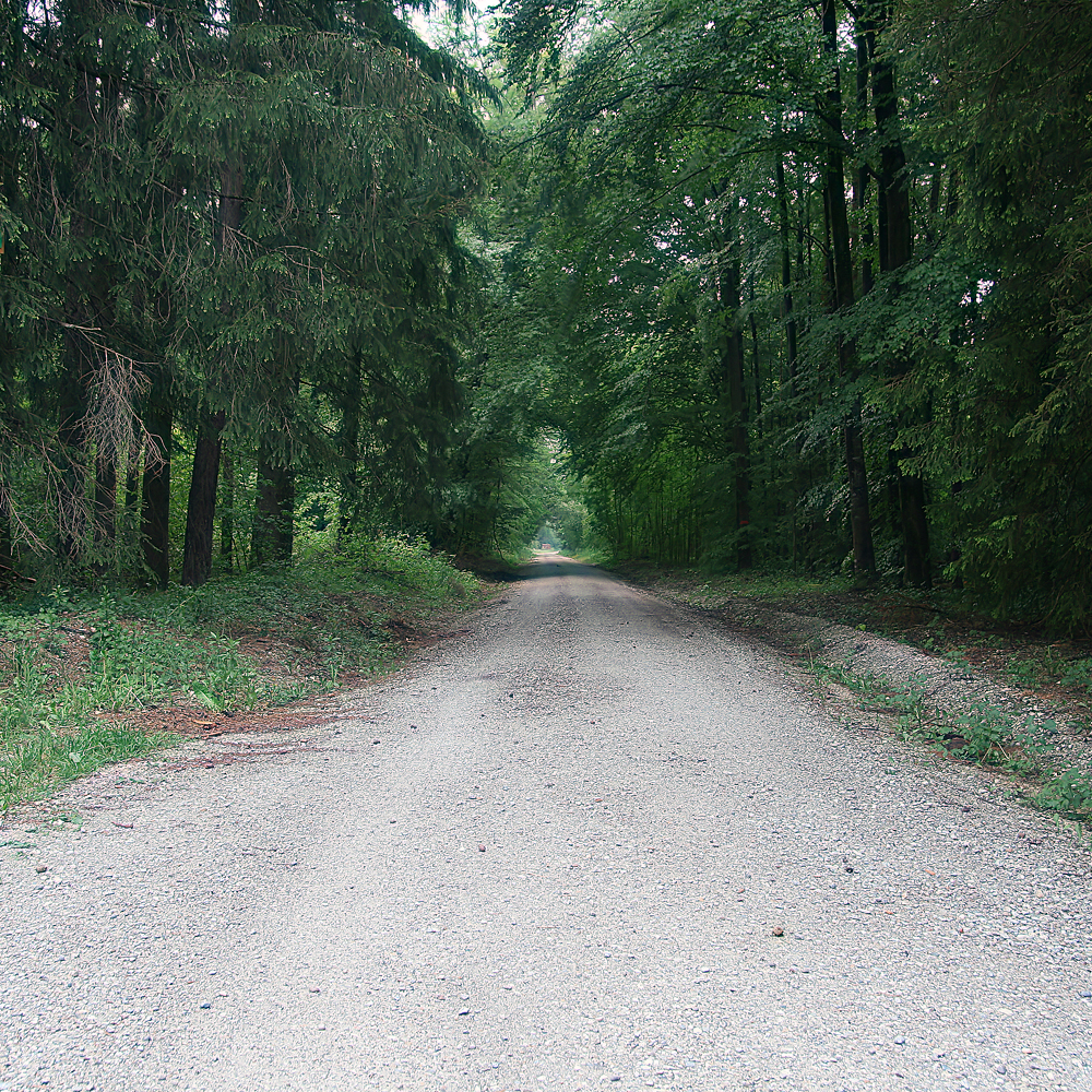 Beschreibung: Typisch für den Perlacher Forst sind die schnurgeraden, fast unendlich erscheinenden Forstwege